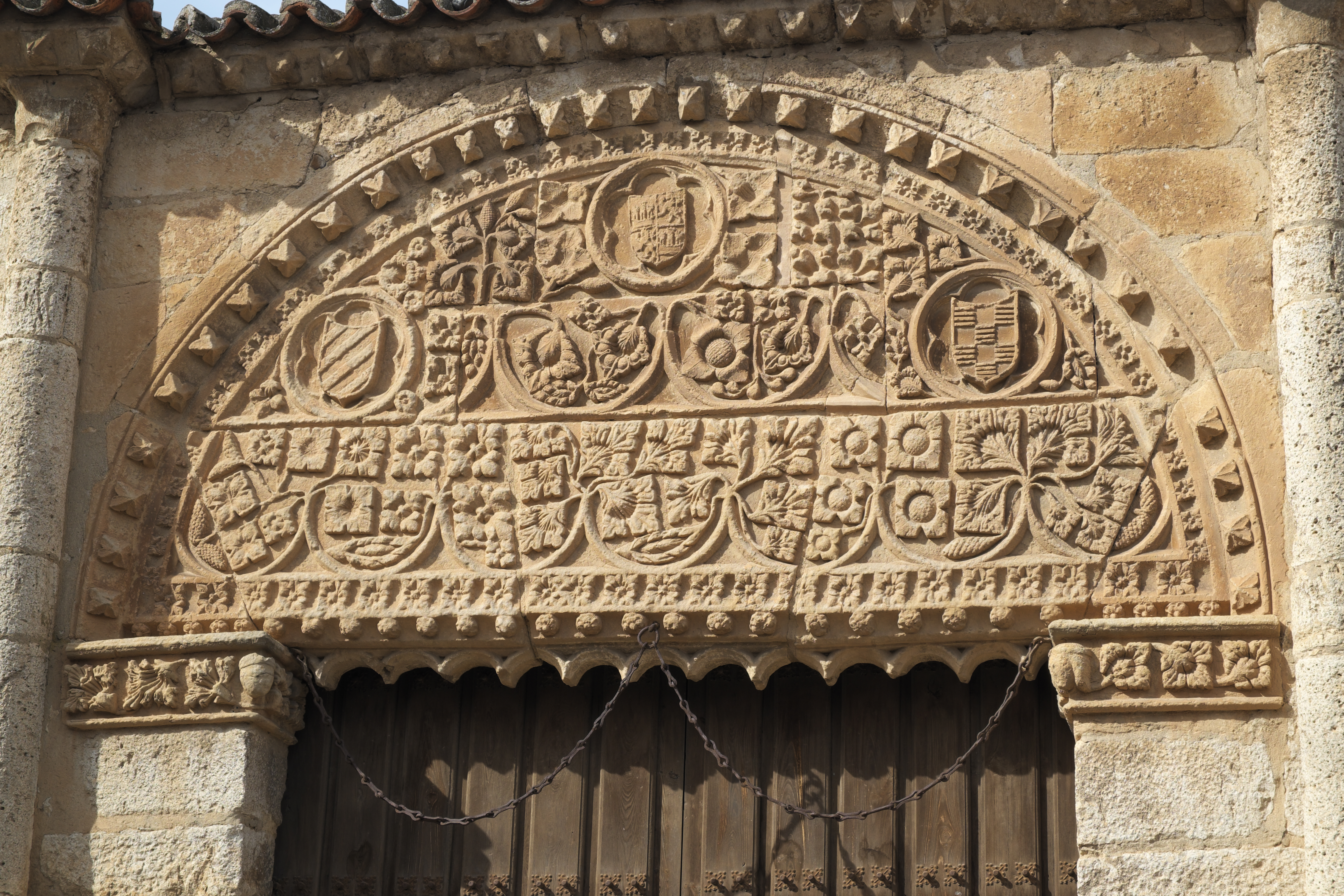 Palacio de las Leyes in Toro in der Provinz Zamora (Kastilien-León/Spanien), vom Palast ist nur noch das Portal erhalten, Tympanon